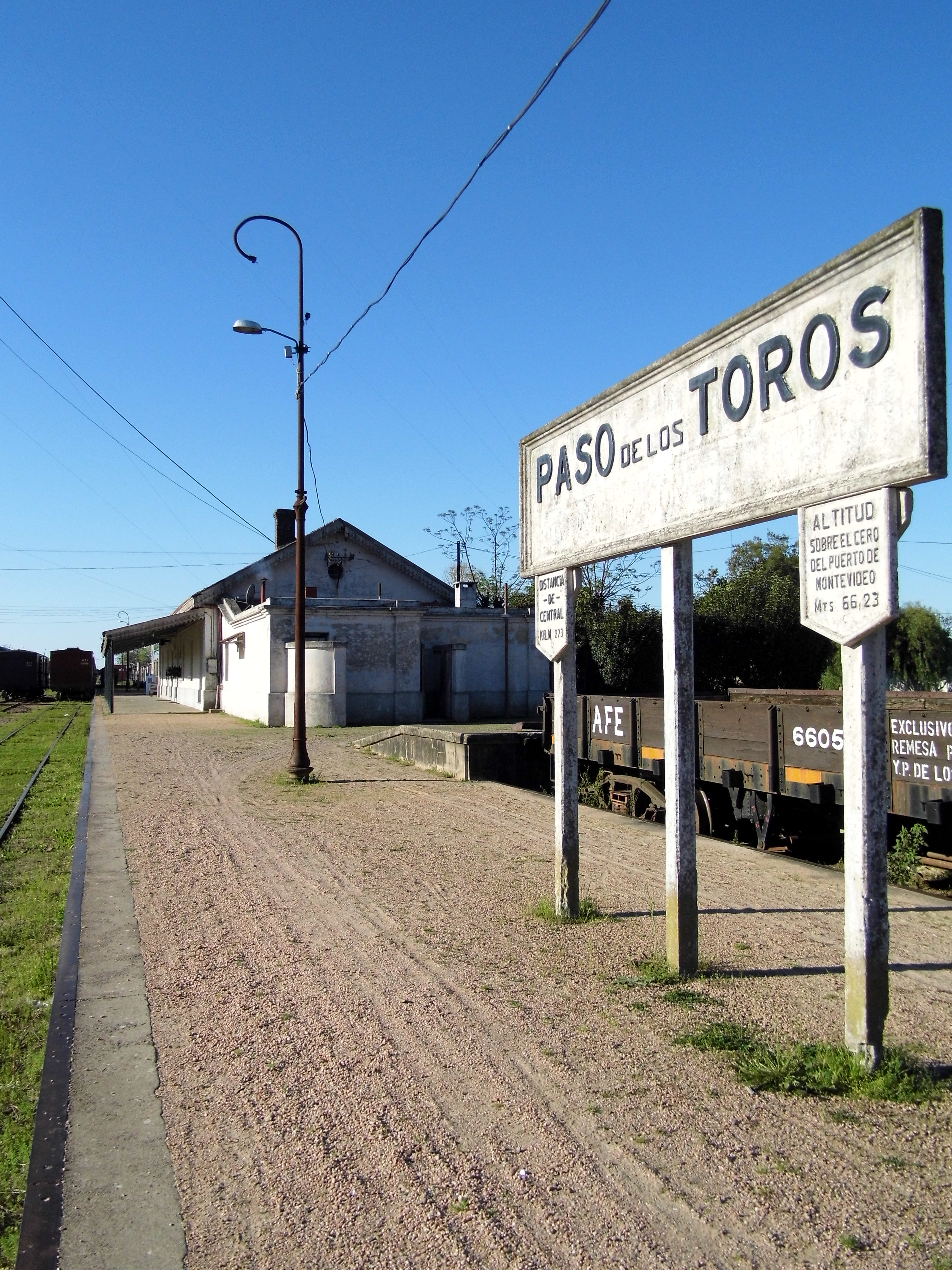 el anuncio de llegada o de partida. La estación,espera.